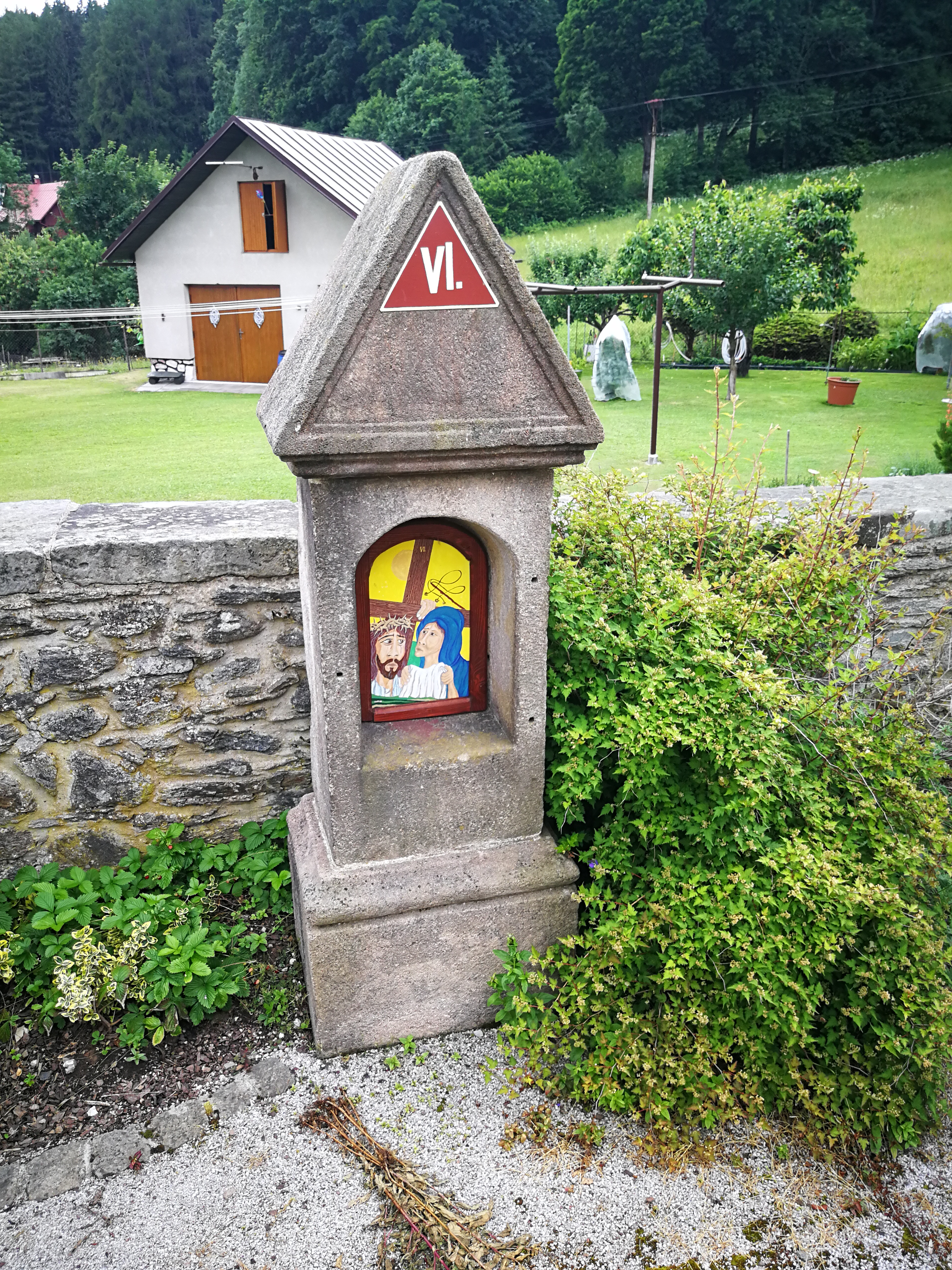 Křížová cesta (Černý Důl) Project: Fotíme Česko.